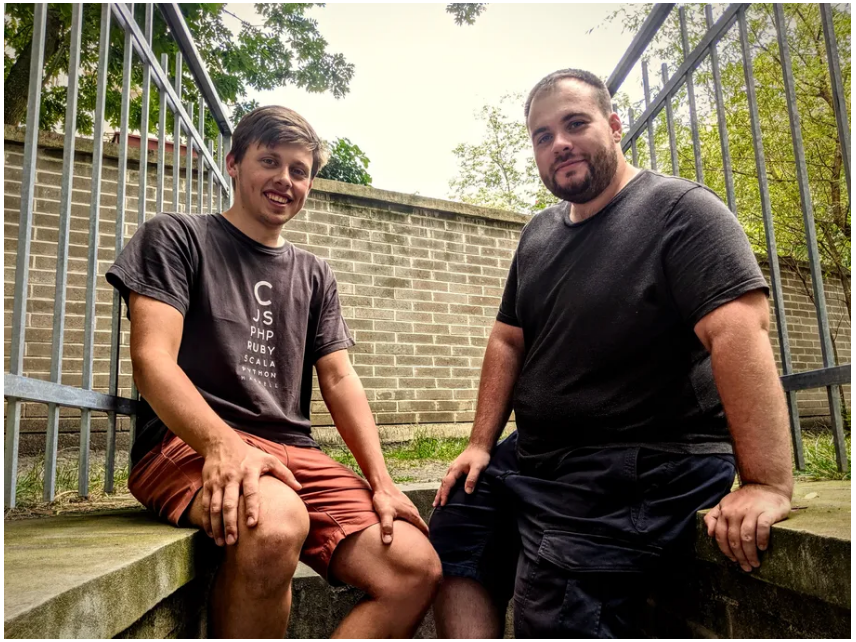 Zakladatelé společnosti Retino Petr Boroš a Kryštof Řeháček. Fotografie vznikla původně přímo v Retinu.